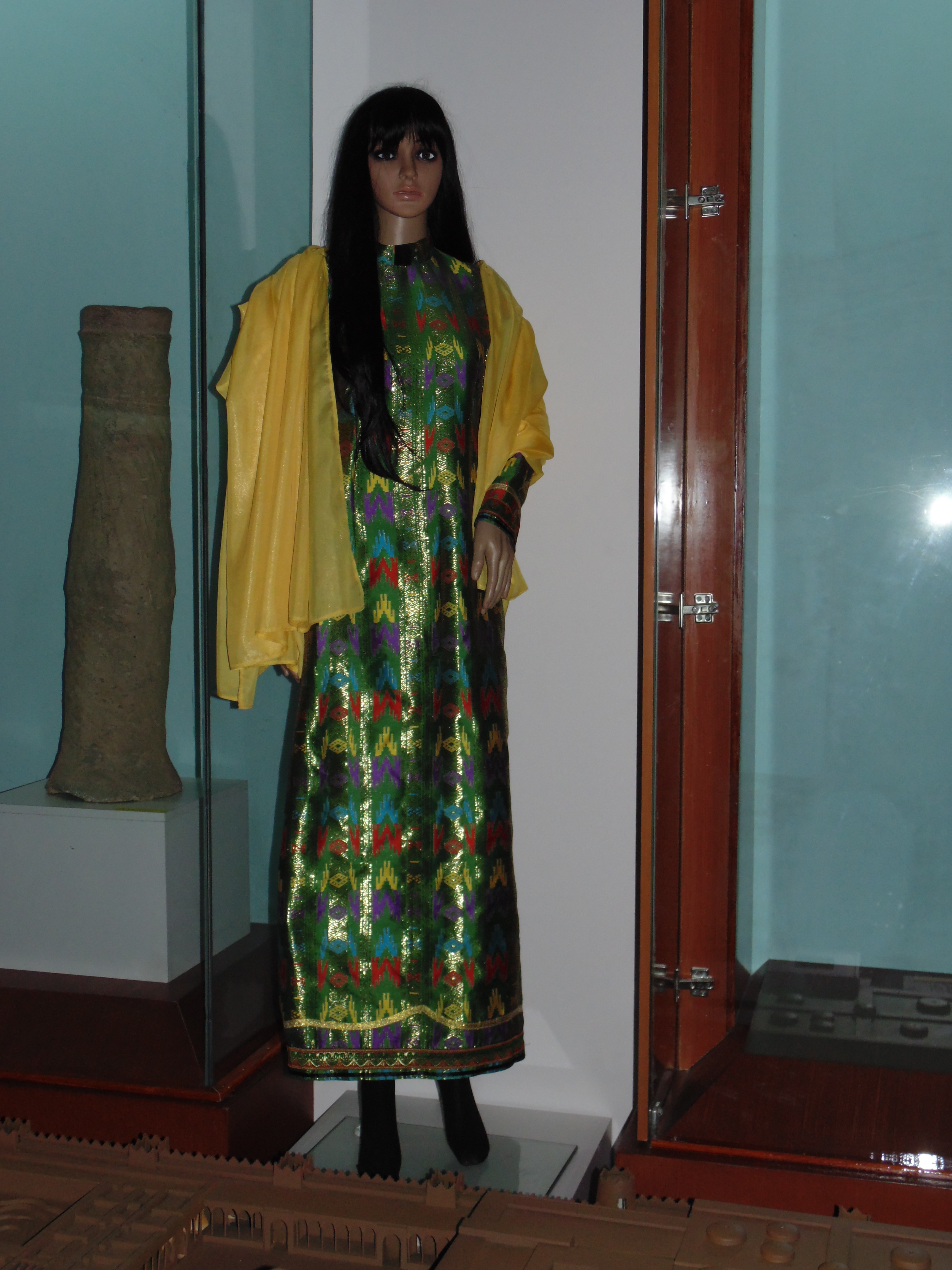 Бактрийская женская одежда Кафирниган. Экспонат находится в Национальном музее Таджикистана (г Душанбе)